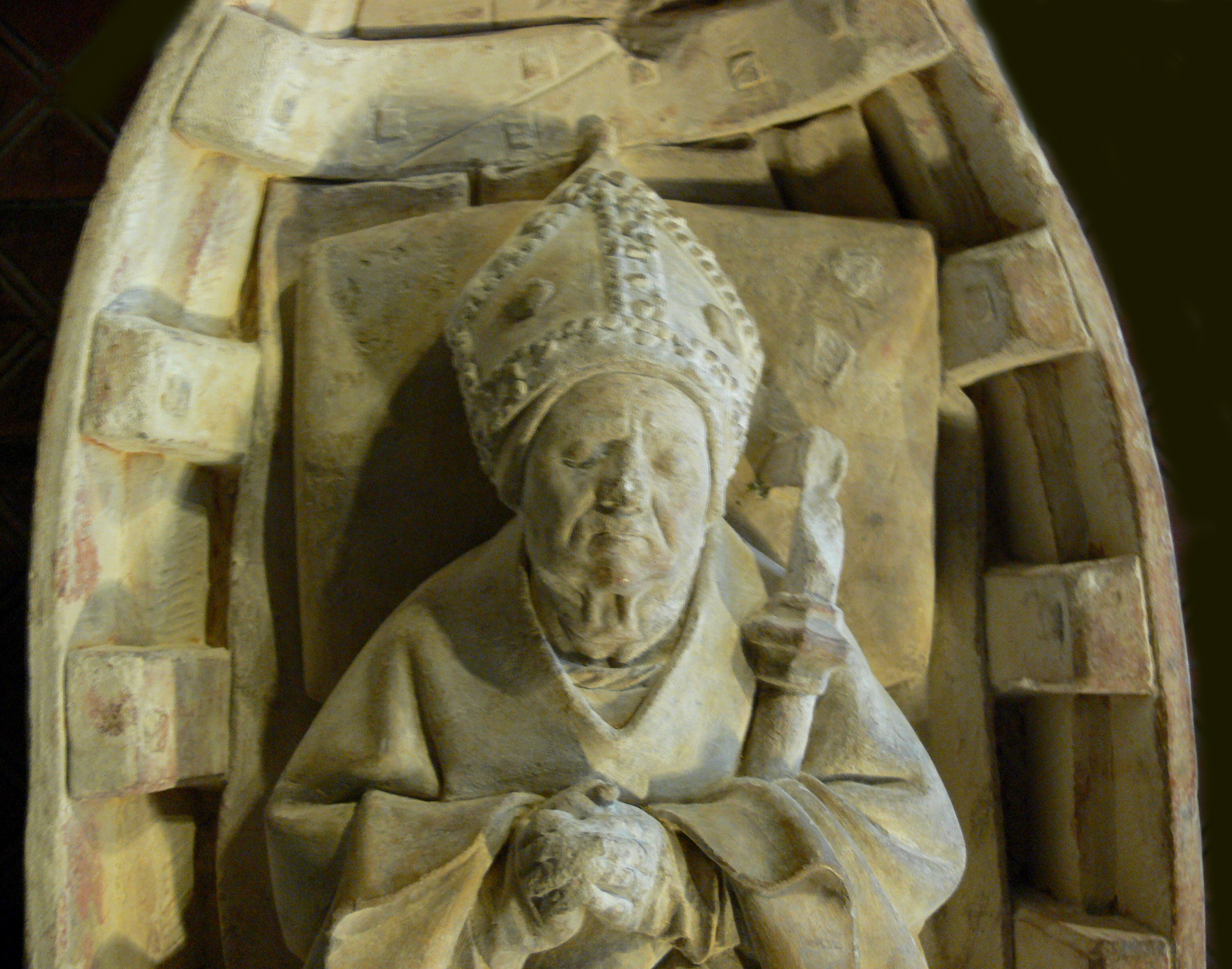 München, Bayerisches Nationalmuseum: Totenschiff des hl. Arigius von Nevers, Burgund, 15. Jahrhundert